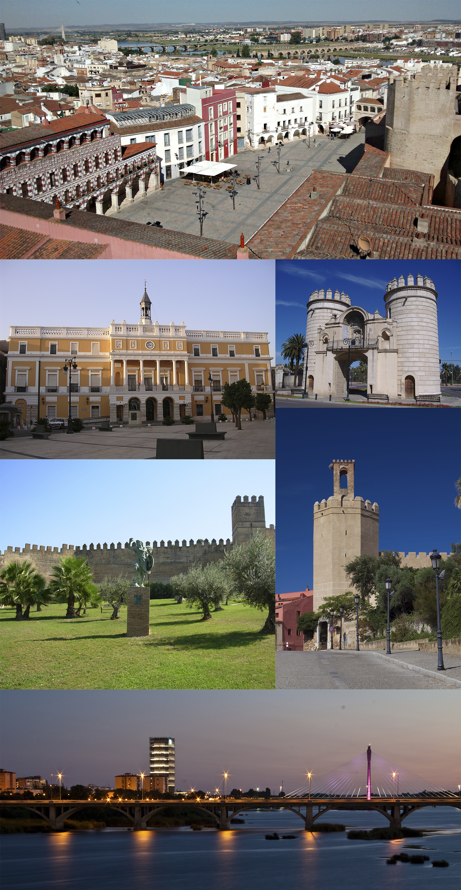 Collage de Badajoz.